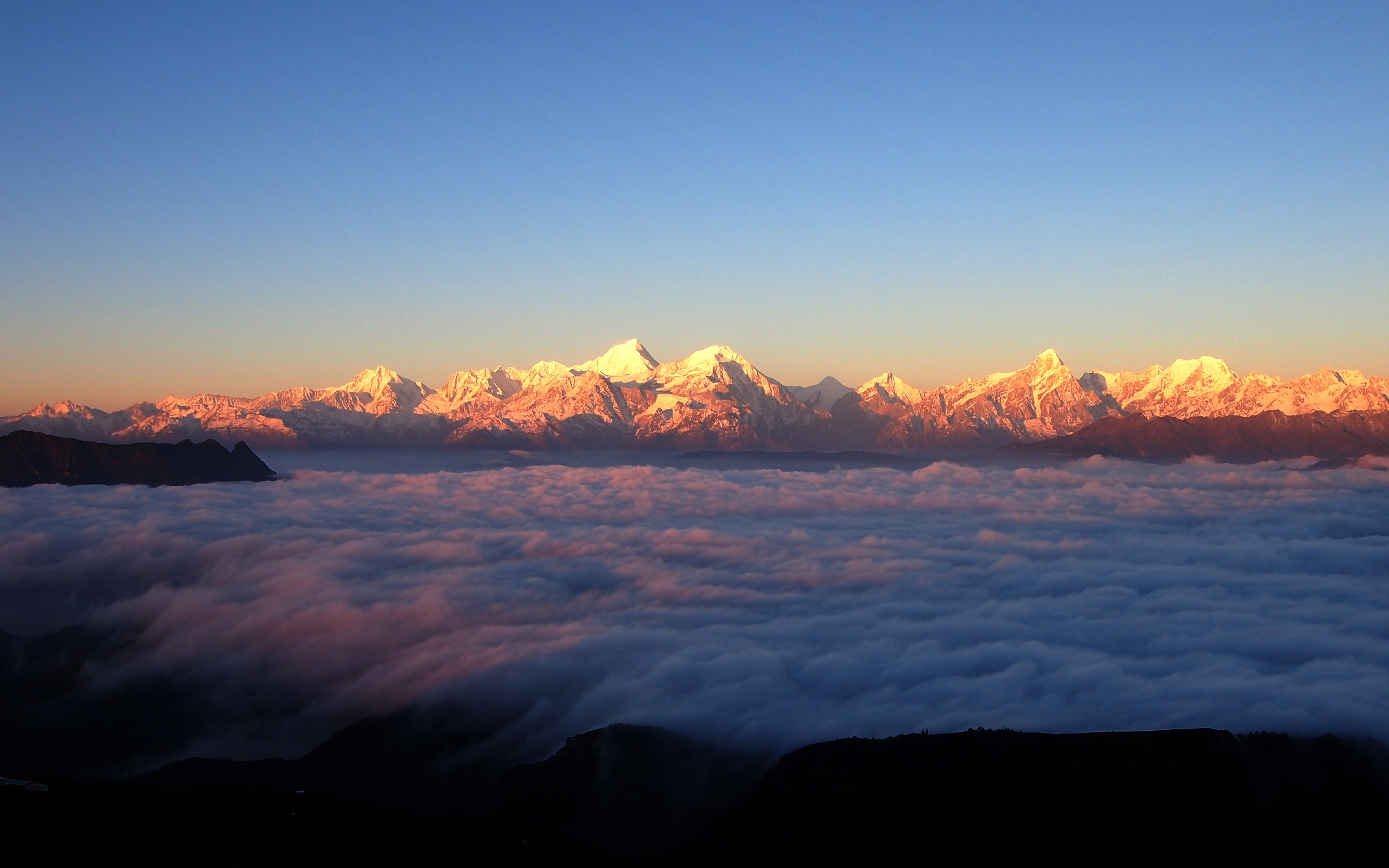 金色贡嘎 - Golden Mountains - 2012.10